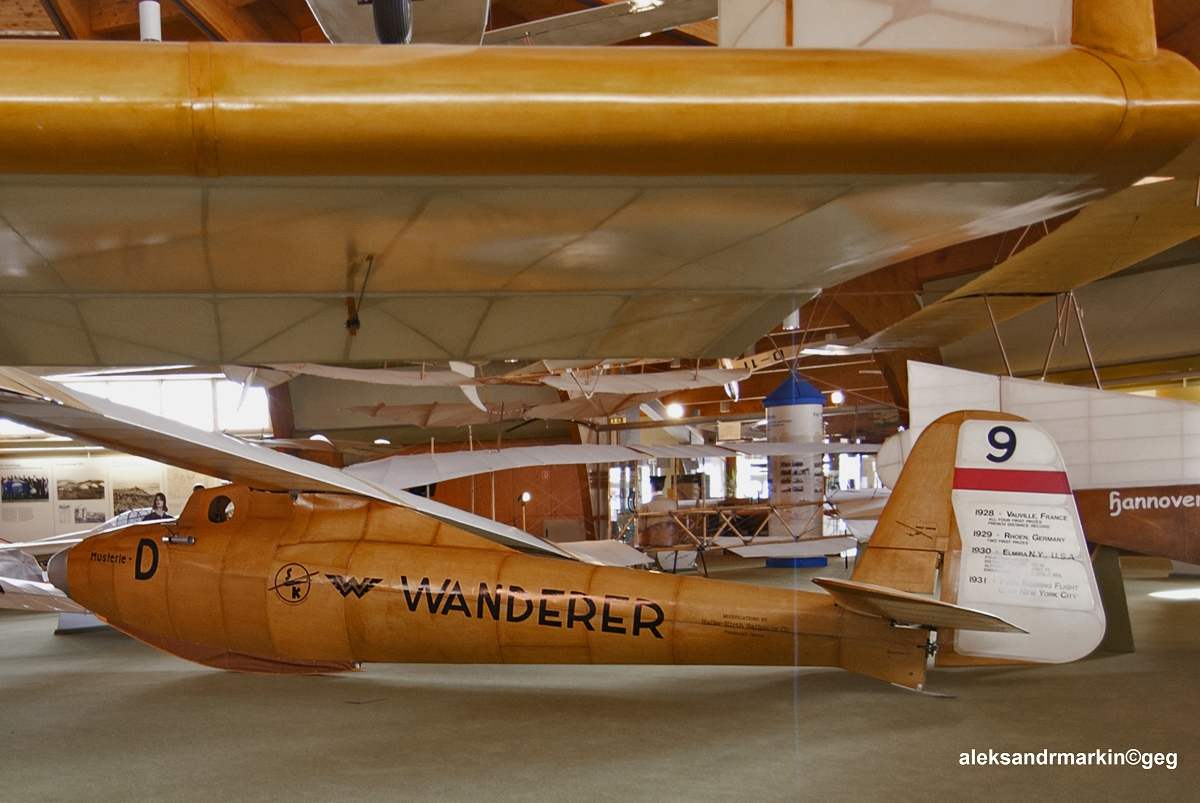 Replica Musterle . Dies ist ein Nachbau des berühmten Rekordflugzeugs. Wolf Hirth flog mit dem Orginal u.a. über New York.